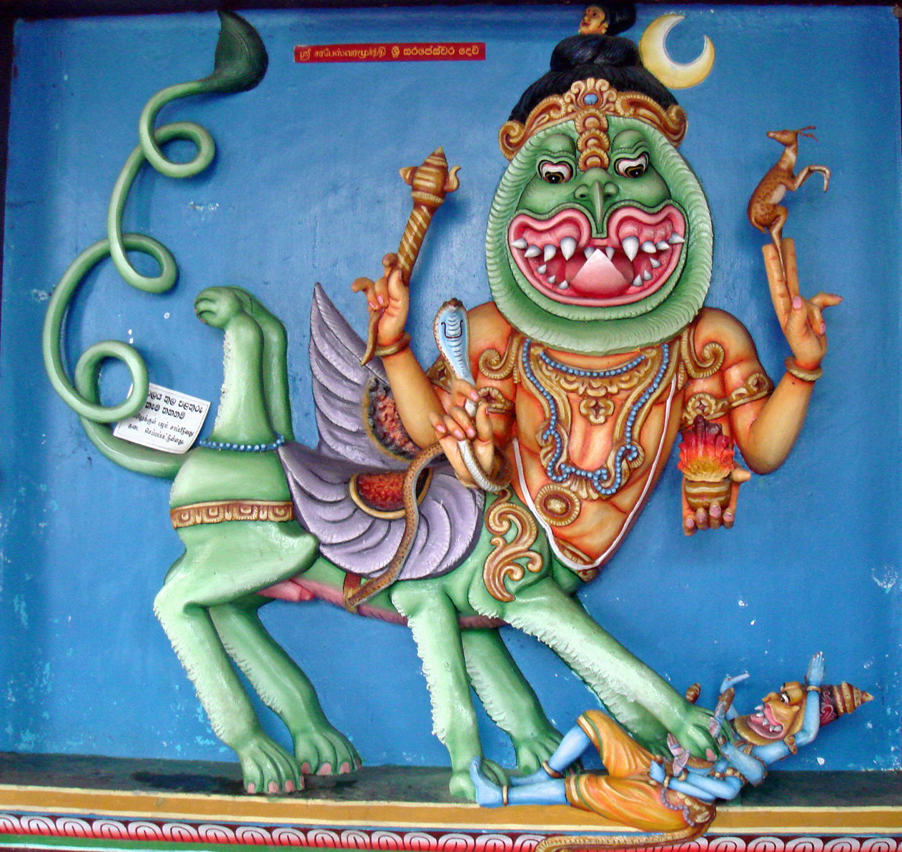 Munneswaram Sharabha overpowering Narasimha